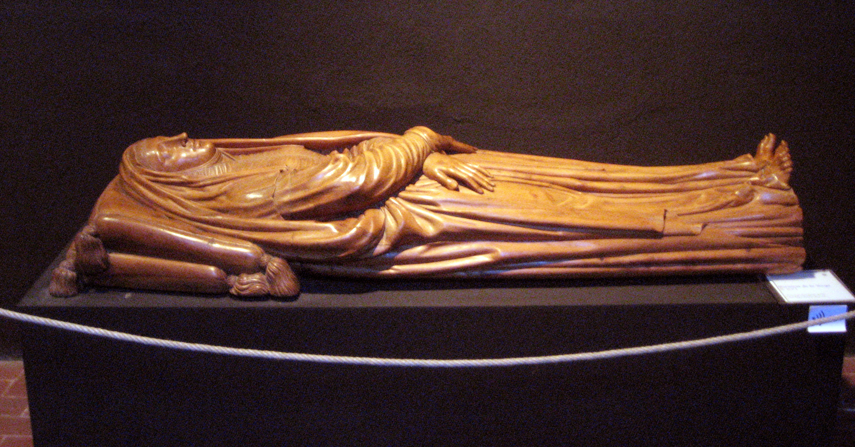 La Dormición de Jeroni Xanxo, conservado en el Museo Diocesano de Urgel (Cataluña) (España)